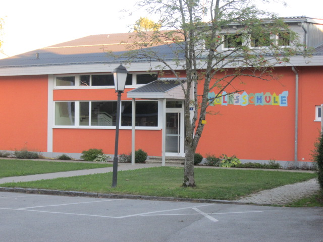 Facciata della scuola di Perwang